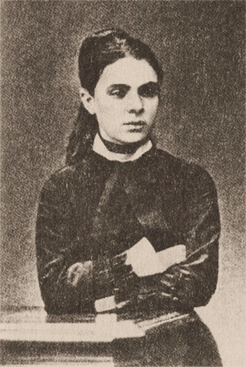 Anna Pavlovna Pribyleva-Korba